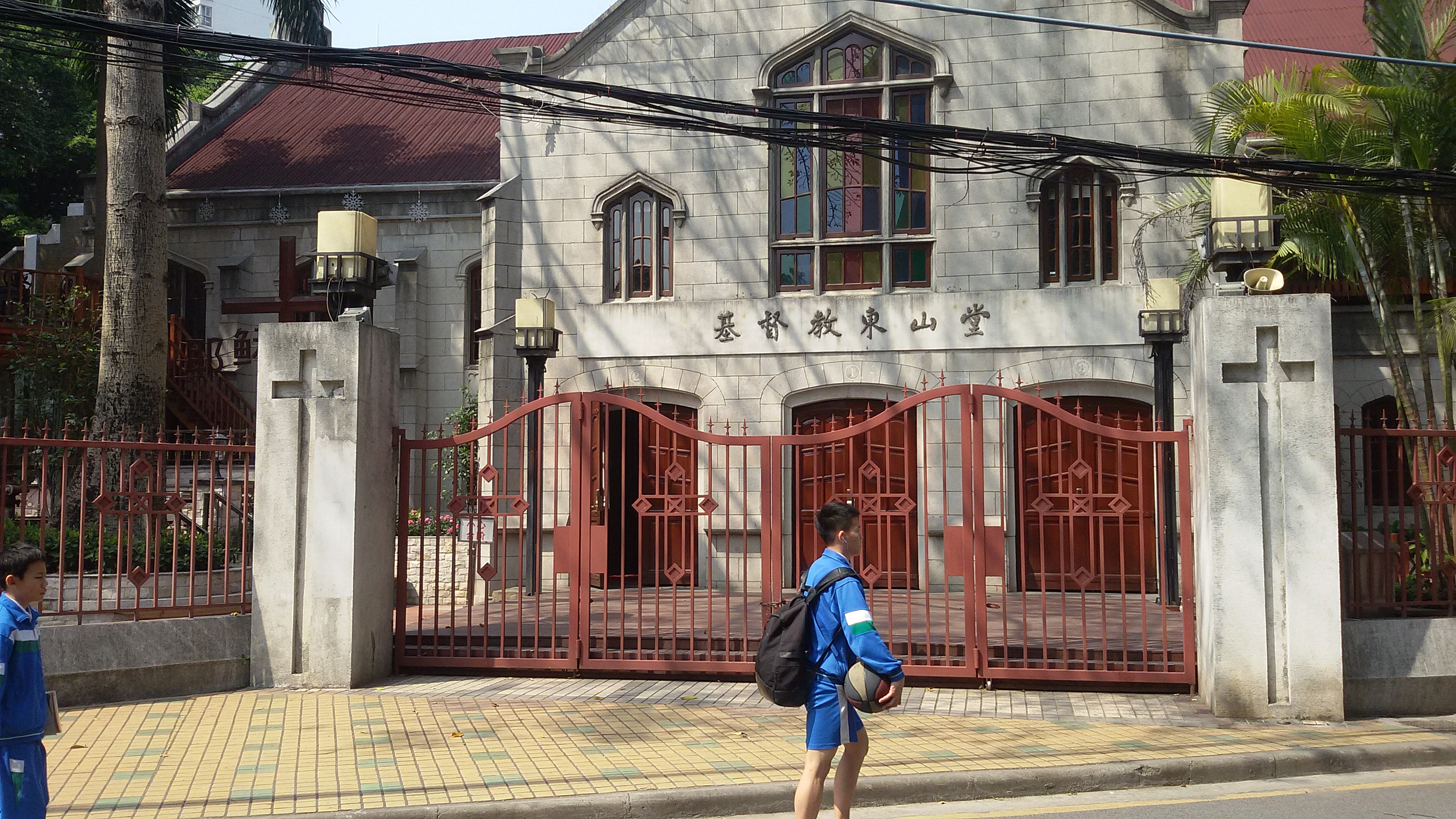 粵語: 基督教東山堂